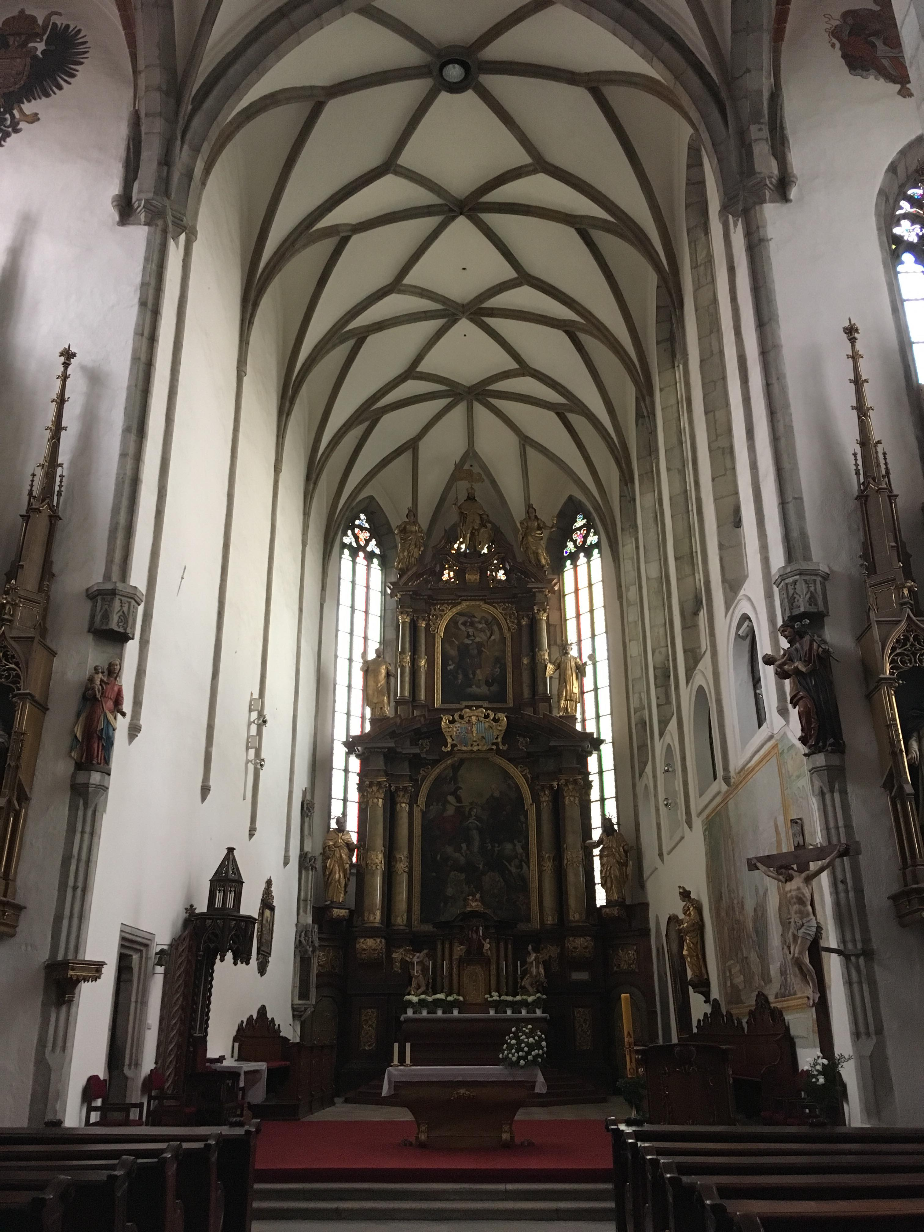 Центральний неф костела святого Віта в Чеському Крумлові